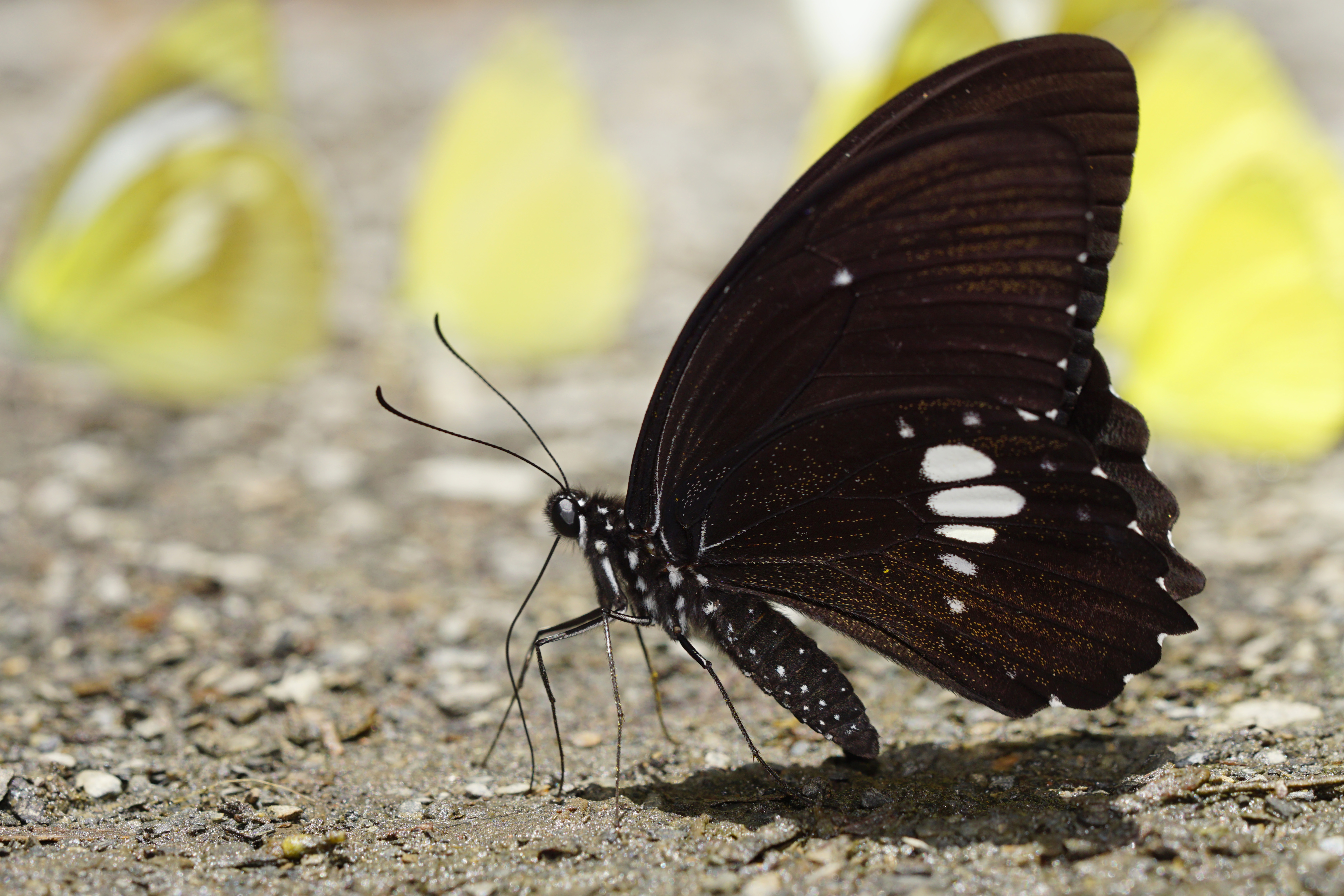 無尾白紋鳳蝶 Papilio castor formosanus